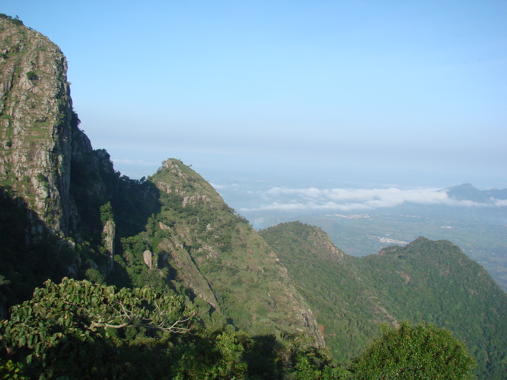 கொல்லி மலை - Kolli Hill